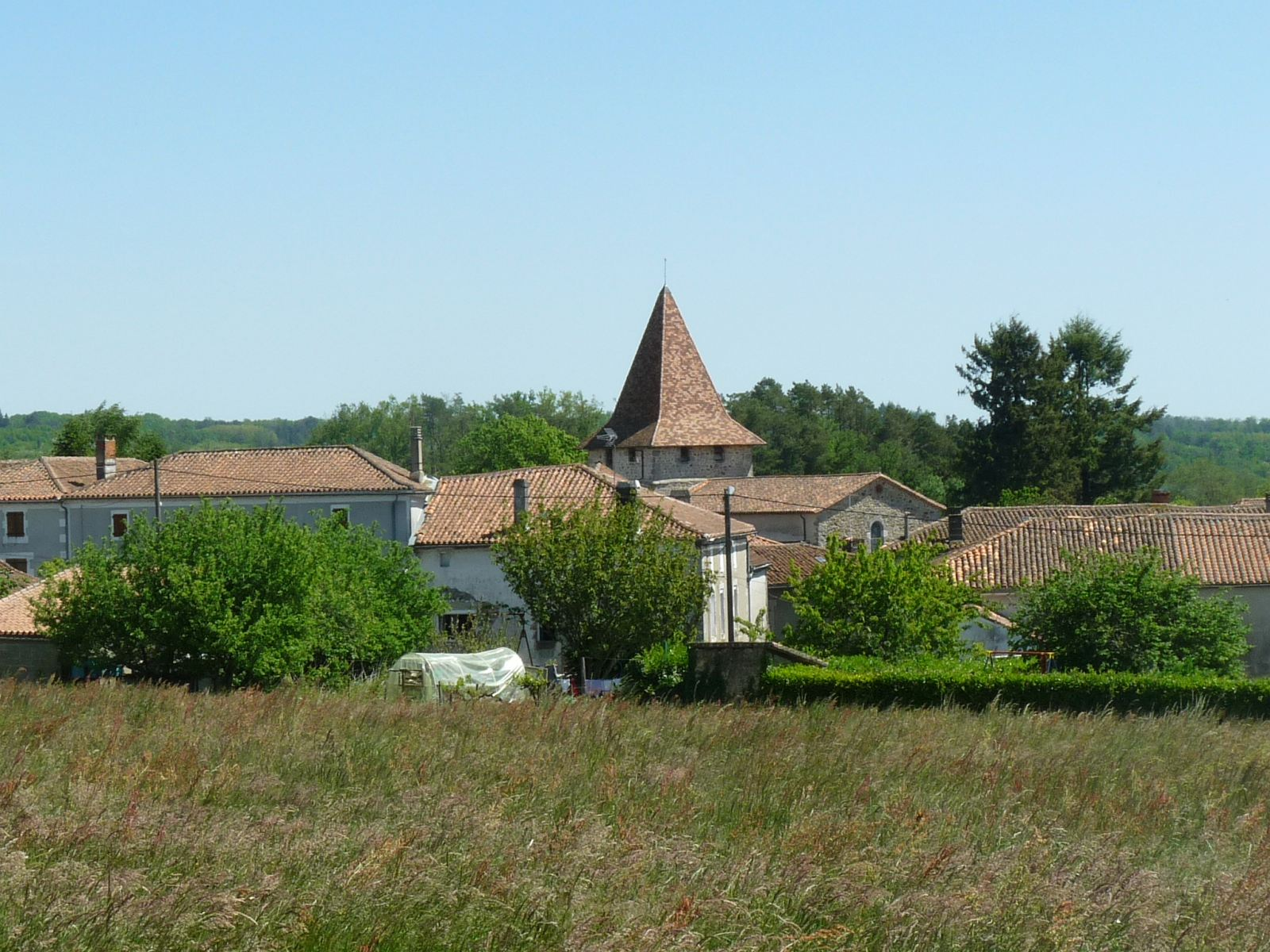 vue de Roussines au printemps depuis la mairie, Charente, France